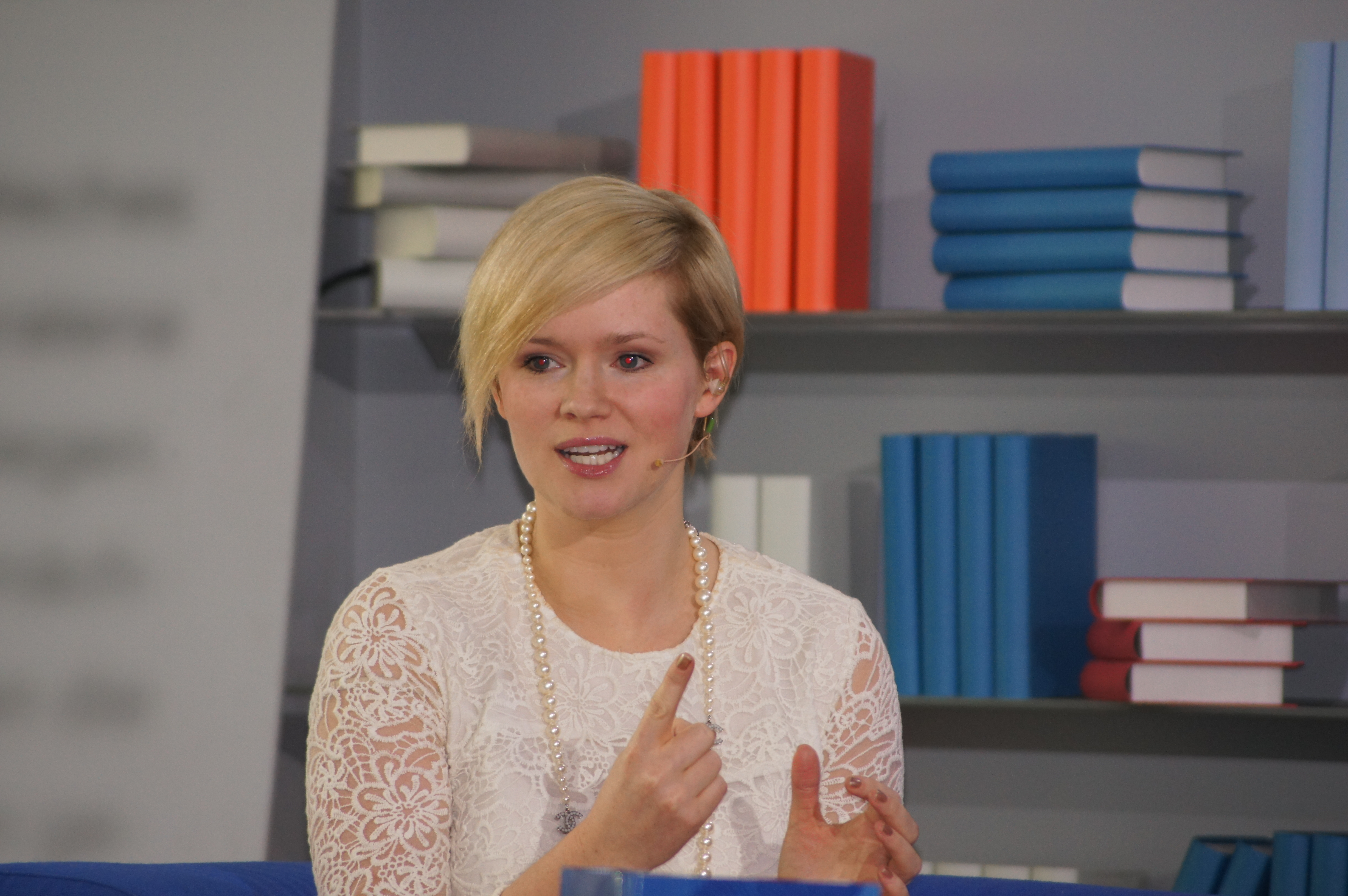 Schriftstellerin Cecelia Ahern im Gespräch auf dem Blauen Sofa während der Frankfurter Buchmesse 2011.